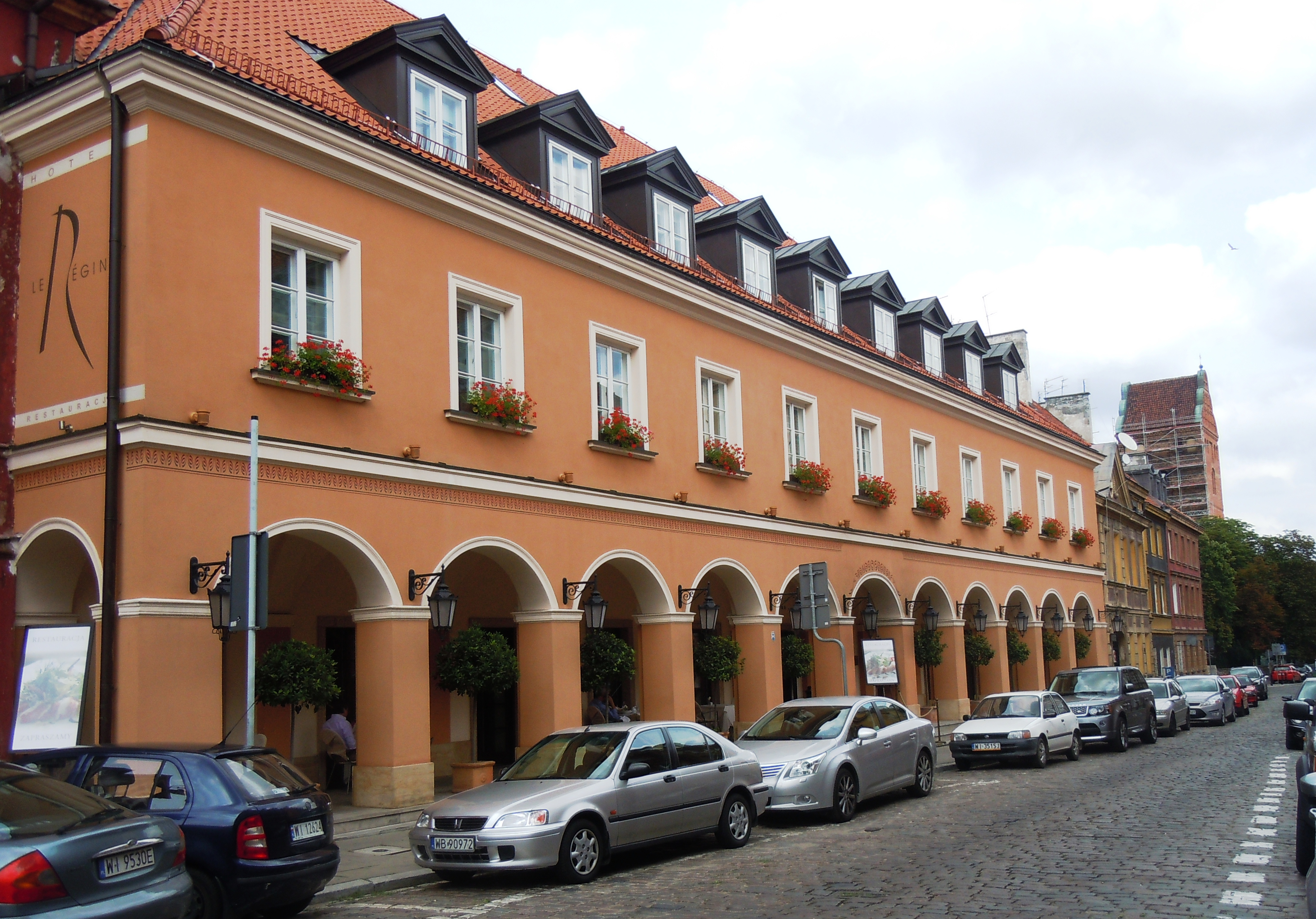 Koscielna es una calle de Nowe Miasto (Ciudad Nueva).